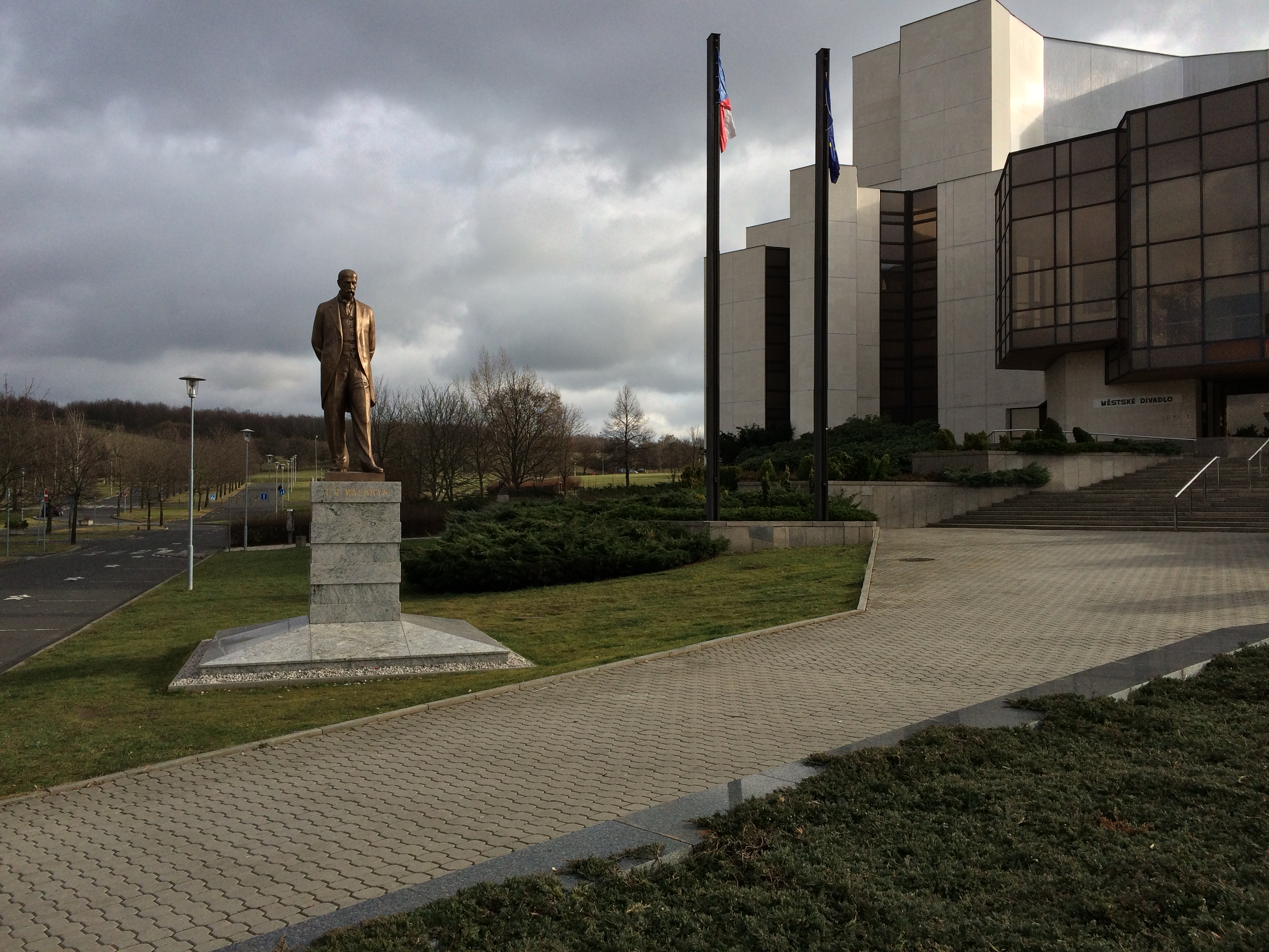 Pomník Tomáše Garrigue Masaryka se nachází poblíž magistrátu v Mostě, v těsném sousedství hotelu Cascade a městského divadla. Původní sochu T. G. Masaryka vytvořil sochař Josef Fojtík kolem roku 1935. V roce 1938 byla Němci odstraněna a počátkem roku 1940 roztavena. Socha byla znovuobnovena v roce 1946 ale opětovně byla odstraněna v roce 1955. V roce 1978 byla socha rozřezána na malé kousky a z této podoby byla znovuzrestaurována až v letech 2012 až 2014 bratranci Mgr. Jaroslavem Šindelářem mladším a Ondřejem Šindelářem. Slavnostně potřetí odhalena dne 23. září 2014.